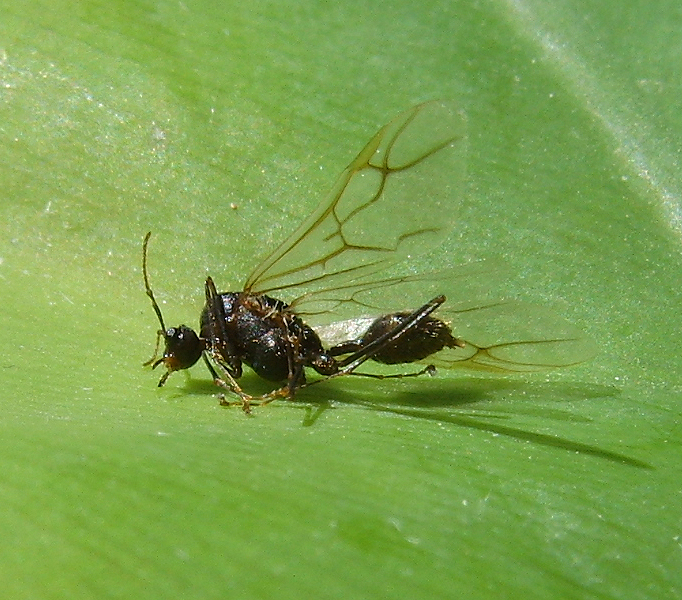 Oecophylla smaragdina male, Thailand